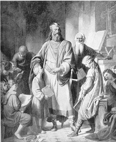 Charlemagne visitant une école d'enfant